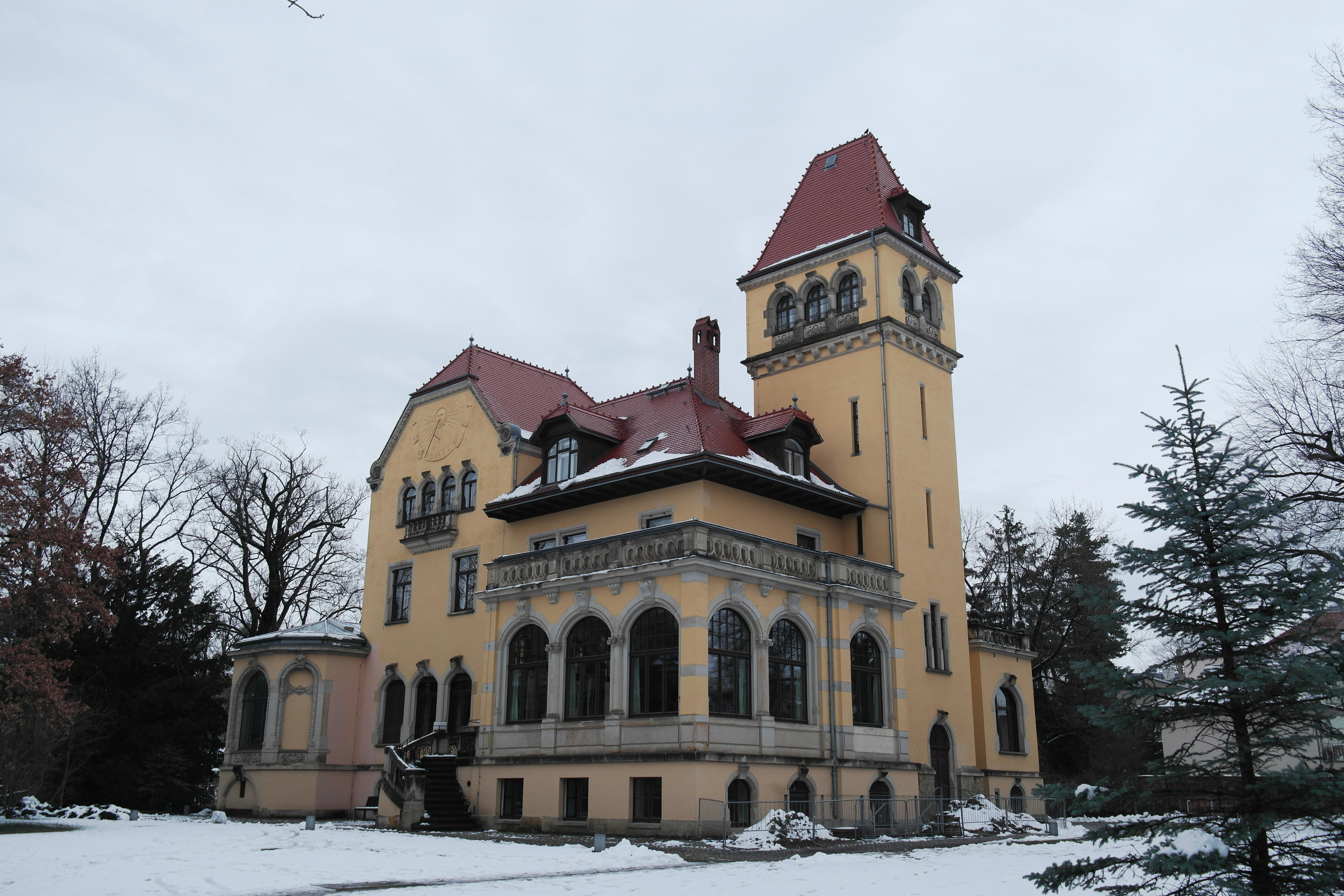 Dresden, Mendelssohnallee 34, Villa Rothermundt. Ansicht Gartenseite mit Treppenhausturm.